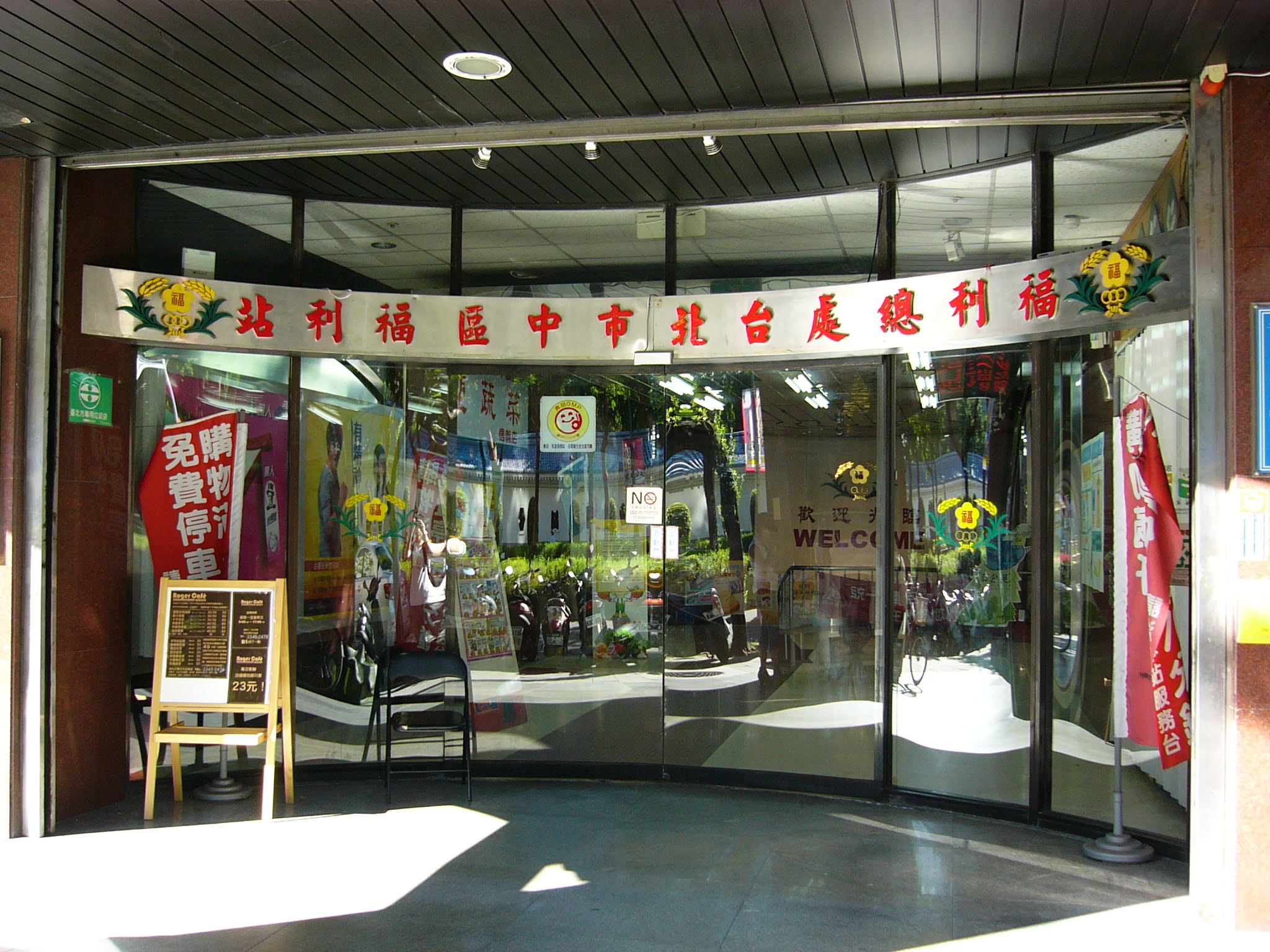 中華民國國防部福利總處台北市中區福利站，位於國防部文化營區地下一樓。